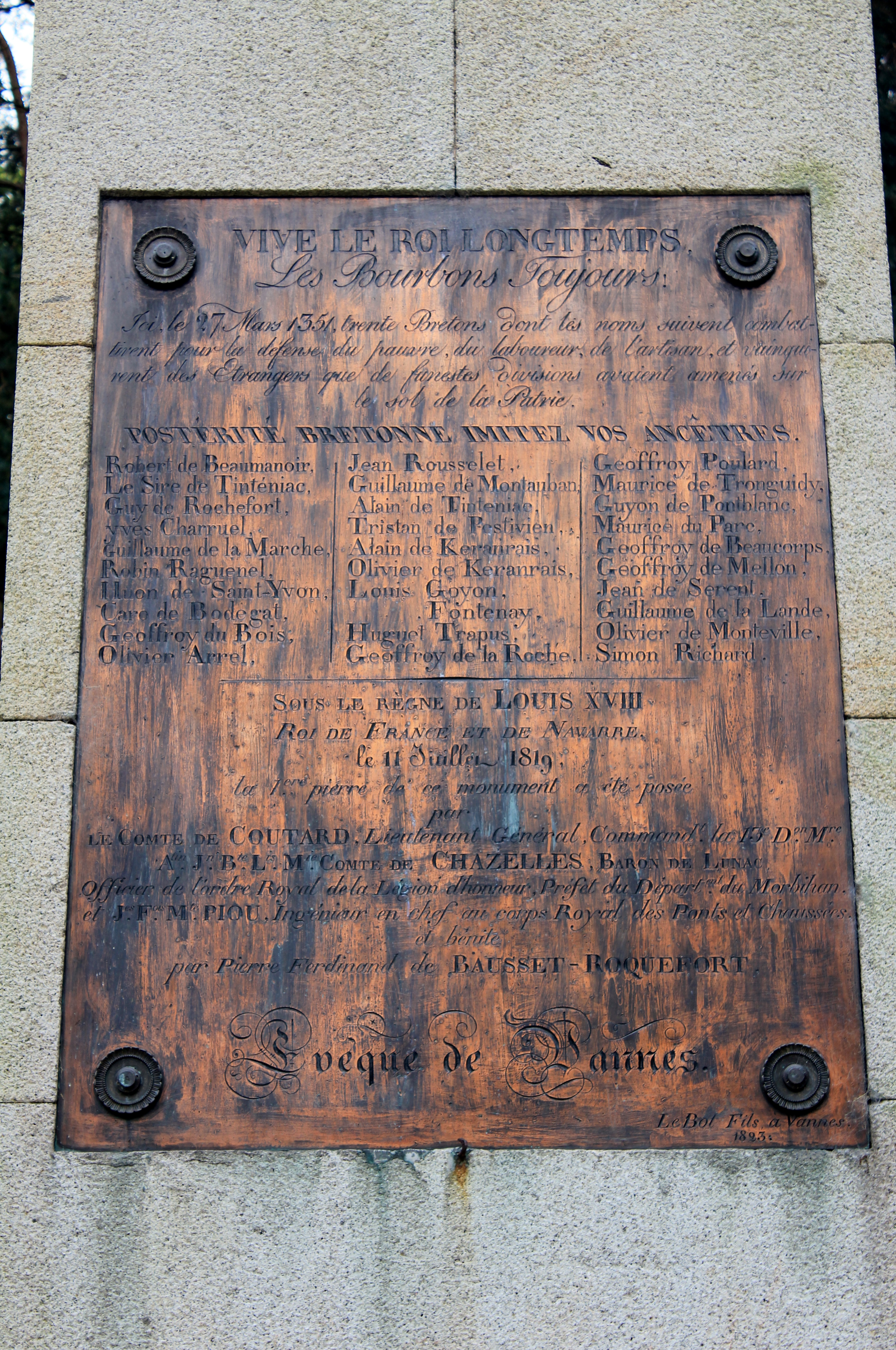 Colonne des Trente